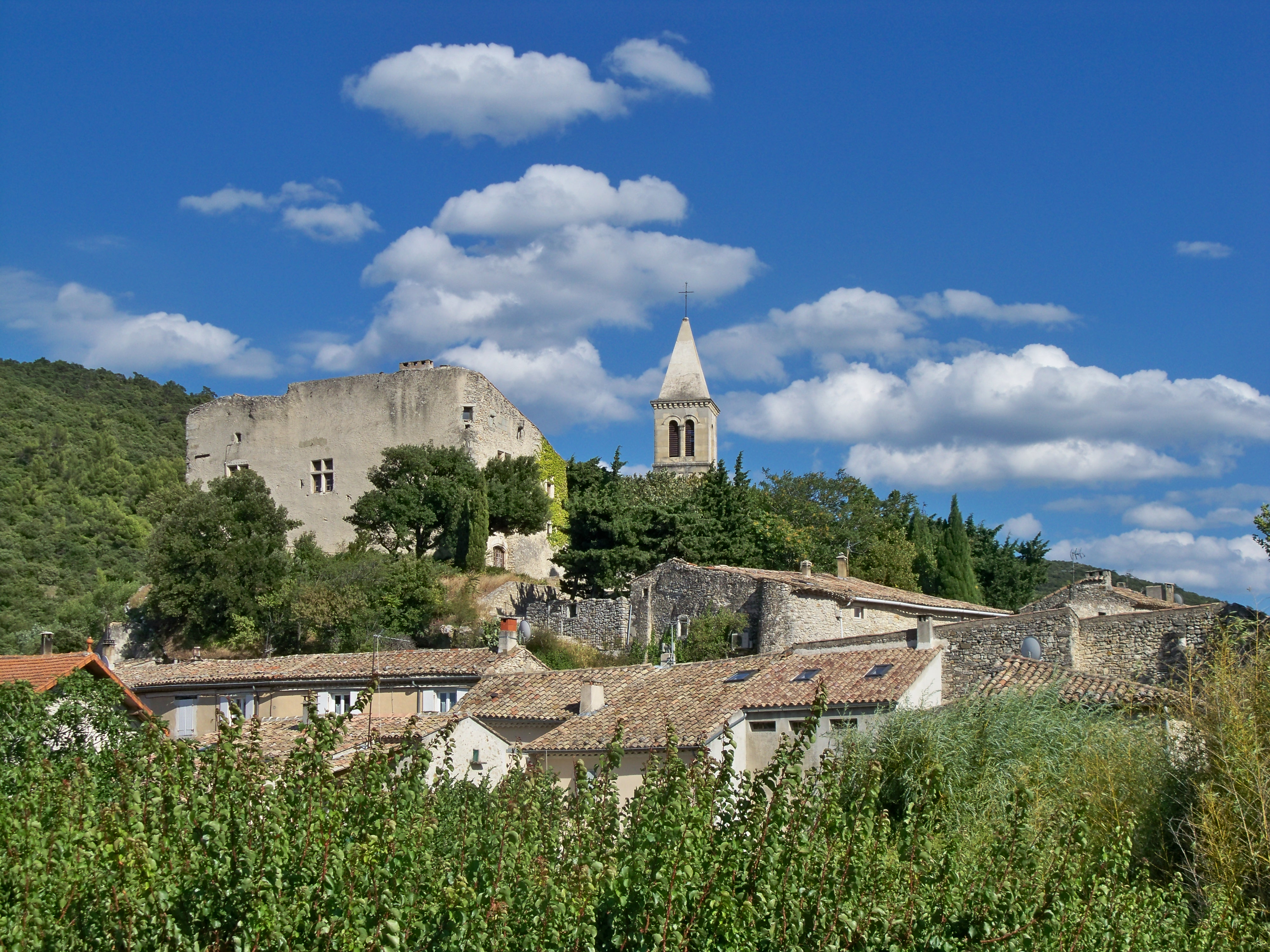 Saint Pantaléon les Vignes, Drôme, France